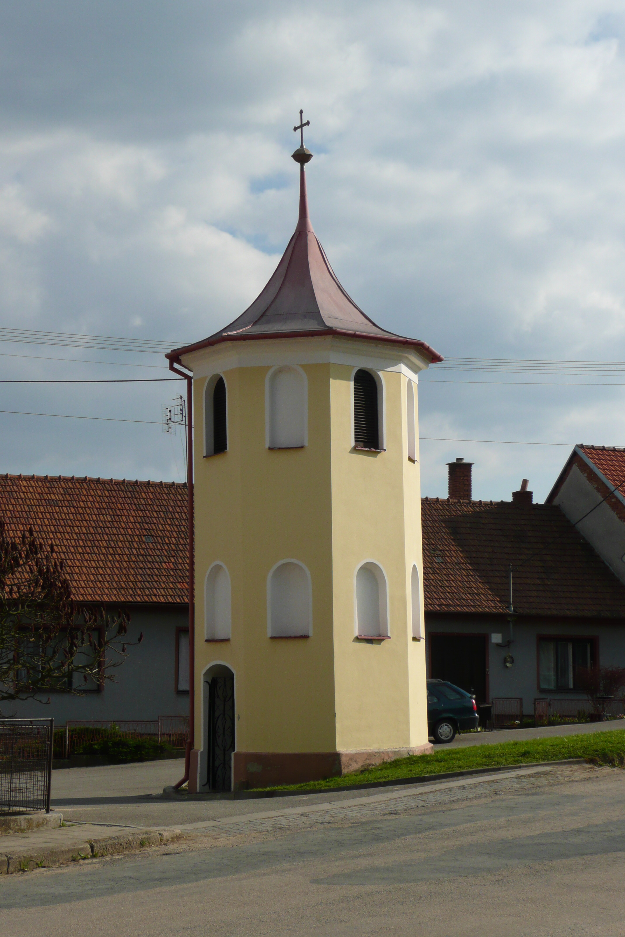 Zvonička v Rudce (u Domašova)